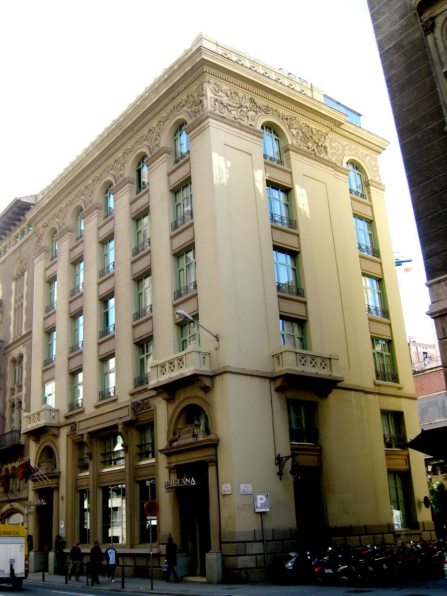 (1918-1921) edifici d'oficines Santana i Soler, obra d'Albert Juan i Torner, a la Via Laietana, 17 (Barcelona-Catalunya). Constitueix una rèplica dels magatzems Walker de Chicago, obra de Louis Henri Sullivan de 1888.